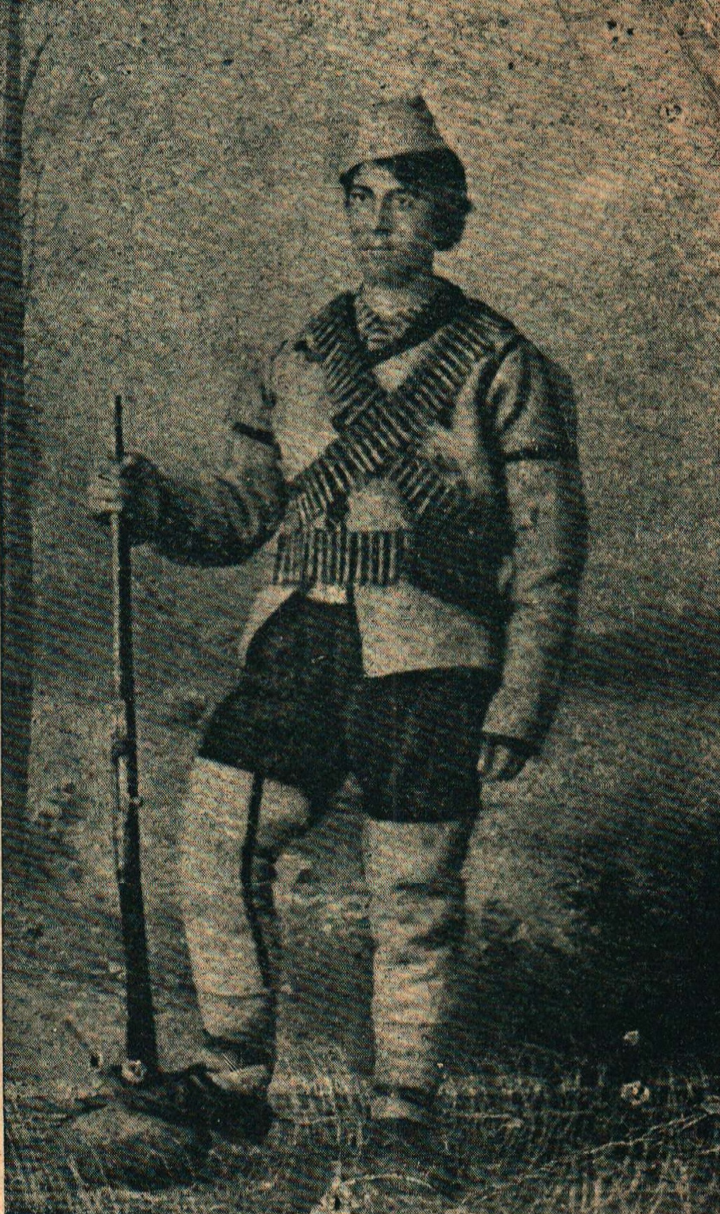 Bulgarian revolutionary Vangel D. Katsarski